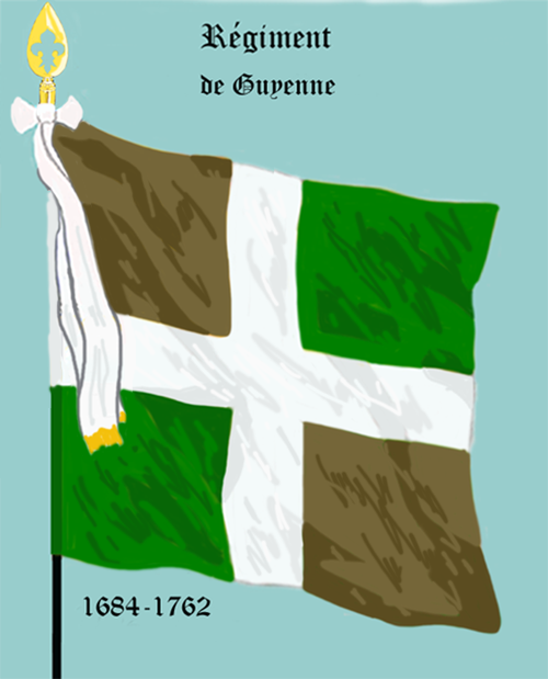 Ordonnanzfahne eines königlich französischen Infanterie-Regiments. - Entnommen und überarbeitet aus: „LES UNIFORMES ET LES DRAPEAUX DE L'ARMÉE DU ROI“ Marseille 1899. (Drapeau d'ordonnance d' un régiment française d'infanterie royale.)